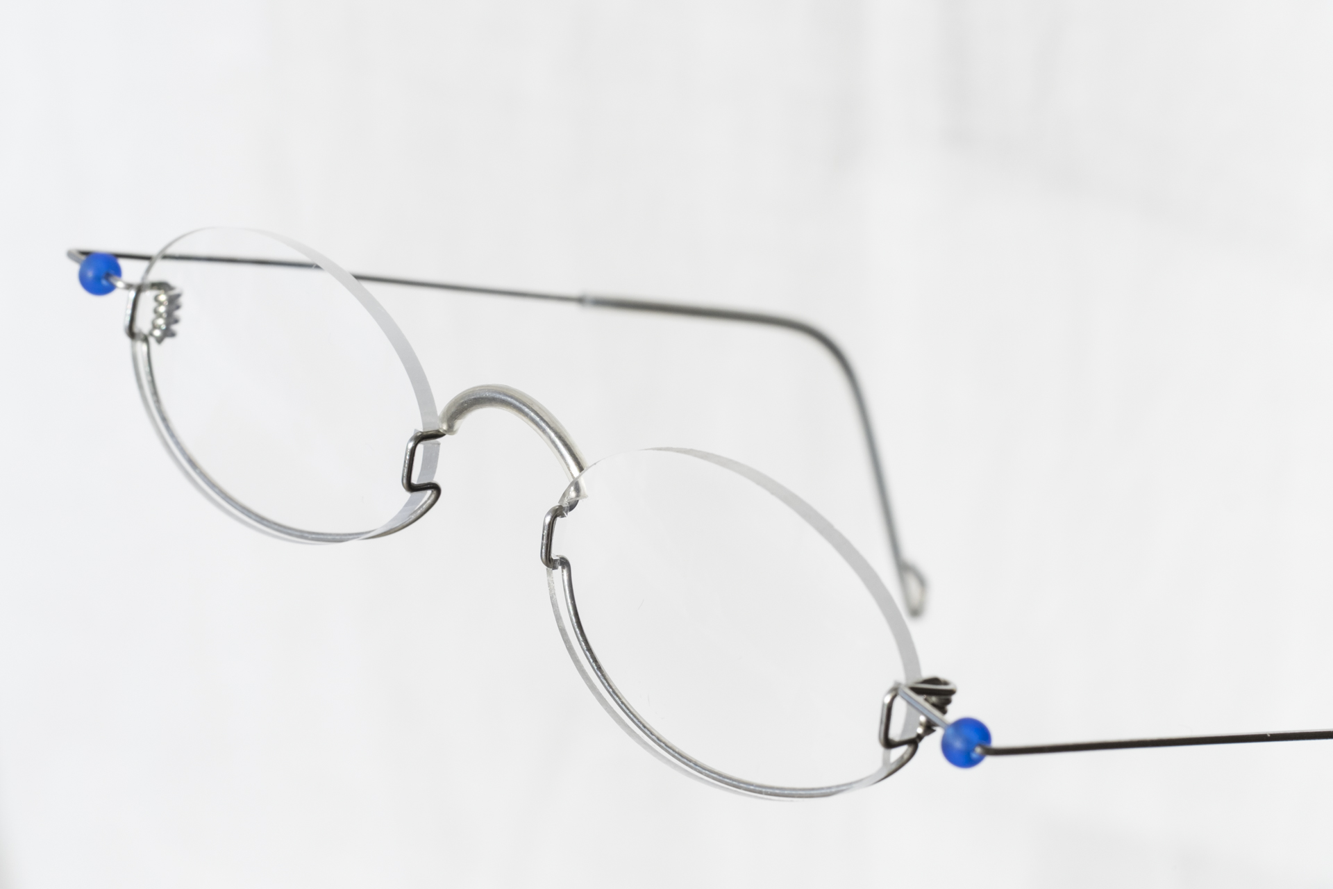 EinDollarBrille: Bild der Brille